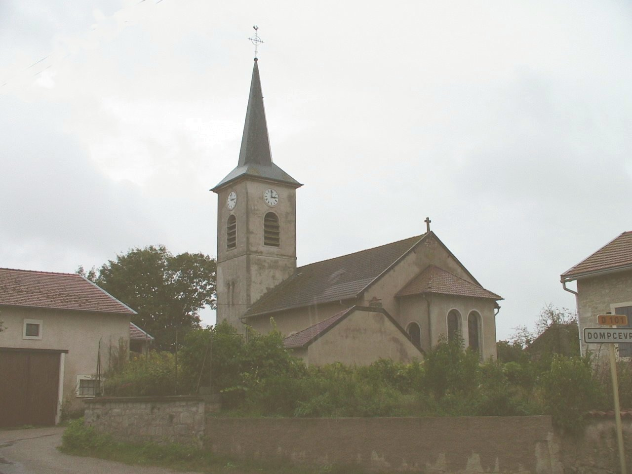 Eglise et village de Maizey (département de la Meuse) Photo prise par F5ZV en automne 2005 Licensing Catégorie:Image de commune de la Meuse